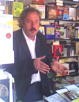 Julio Llamazares en la Feria del Libro de Madrid. (Descripción original)